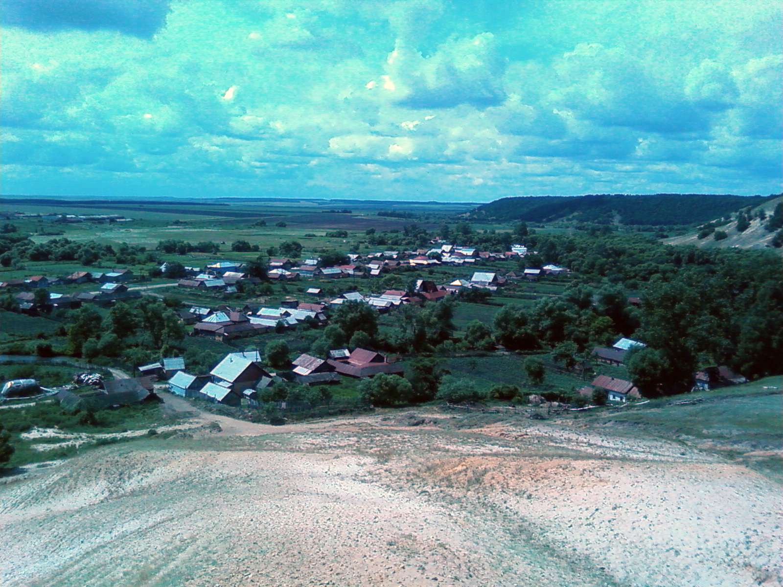 Село Шняево с высоты горы, Базарно-Карабулакский район, Саратовская область